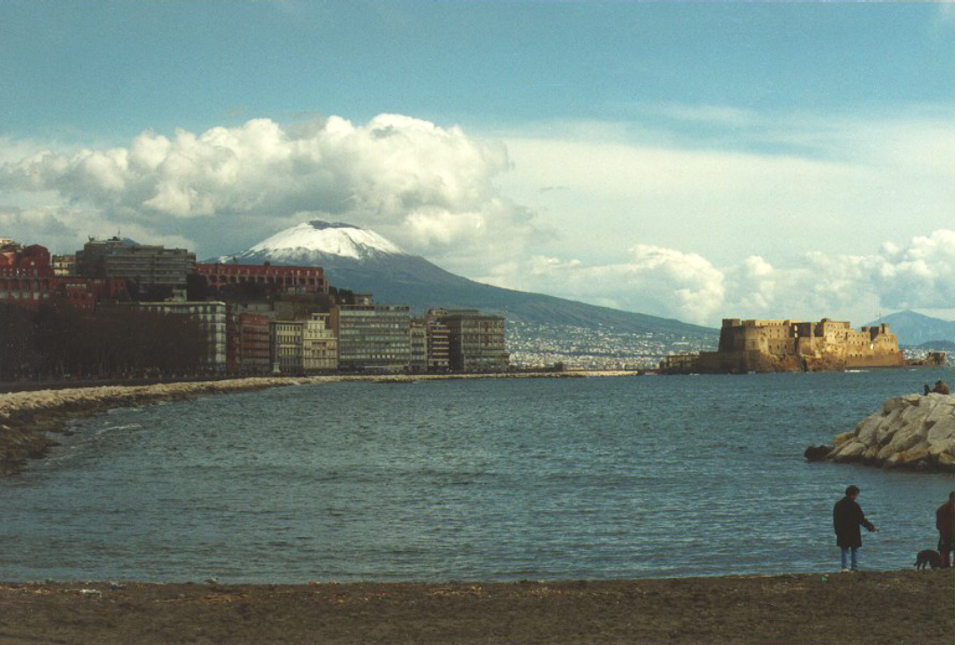 Vesuvio da Via Caracciolo in Napoli